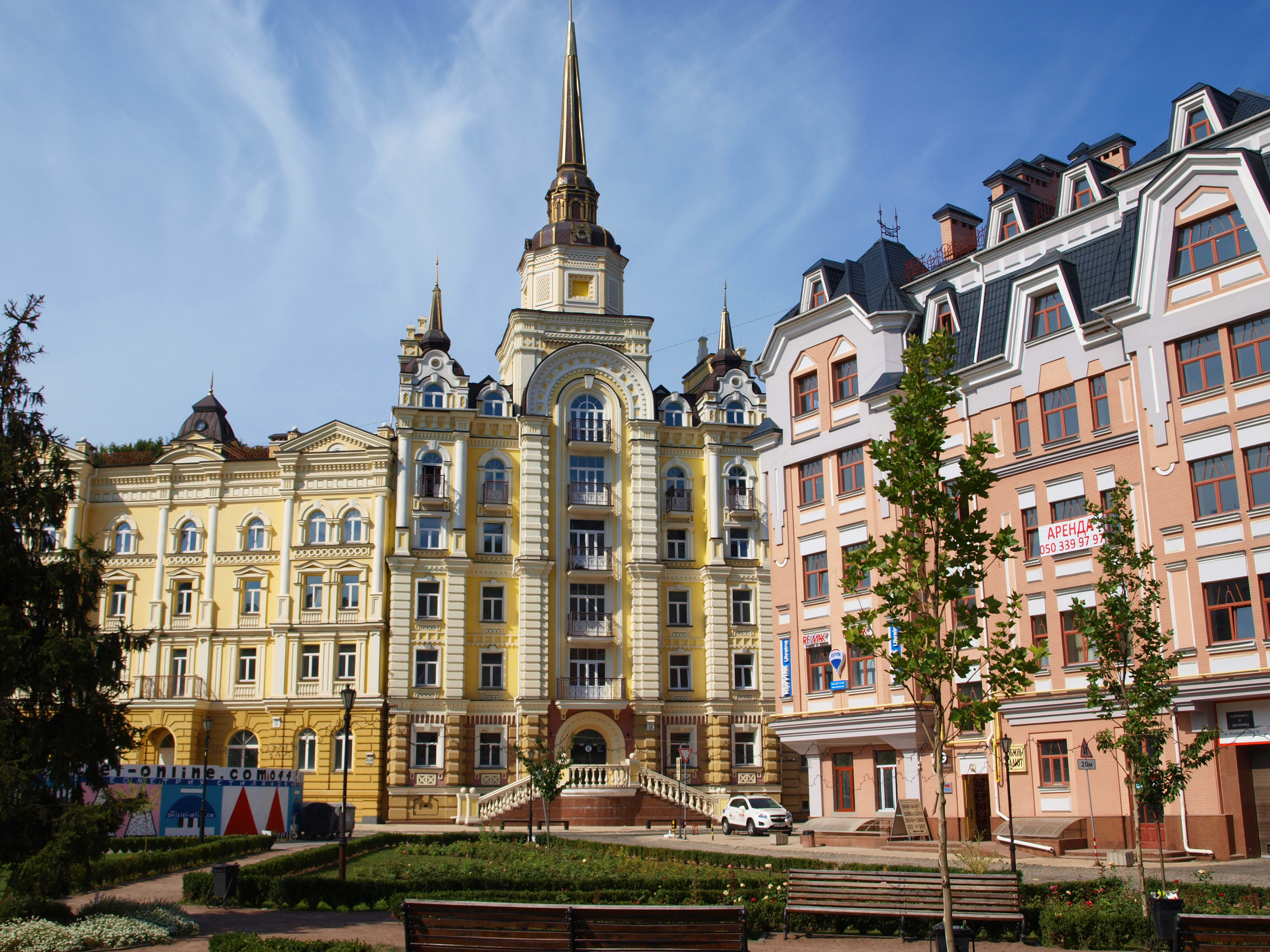 Гончарі-Кожум'яки (Воздвиженка)